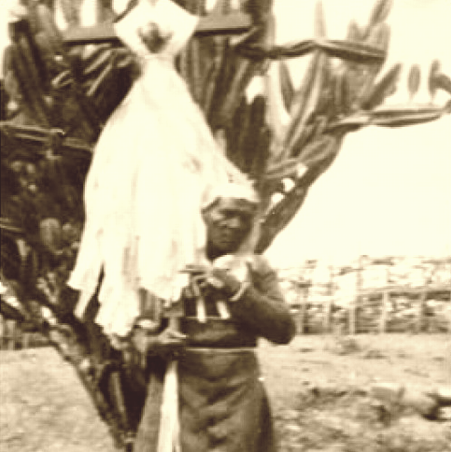 Líder religioso messiânico José Lourenço, comunidade de Caldeirão, Crato, Ceará, Brasil, cerca de 1935.